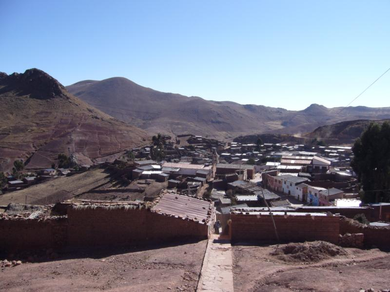 Village d'Ocuri (Potosi)